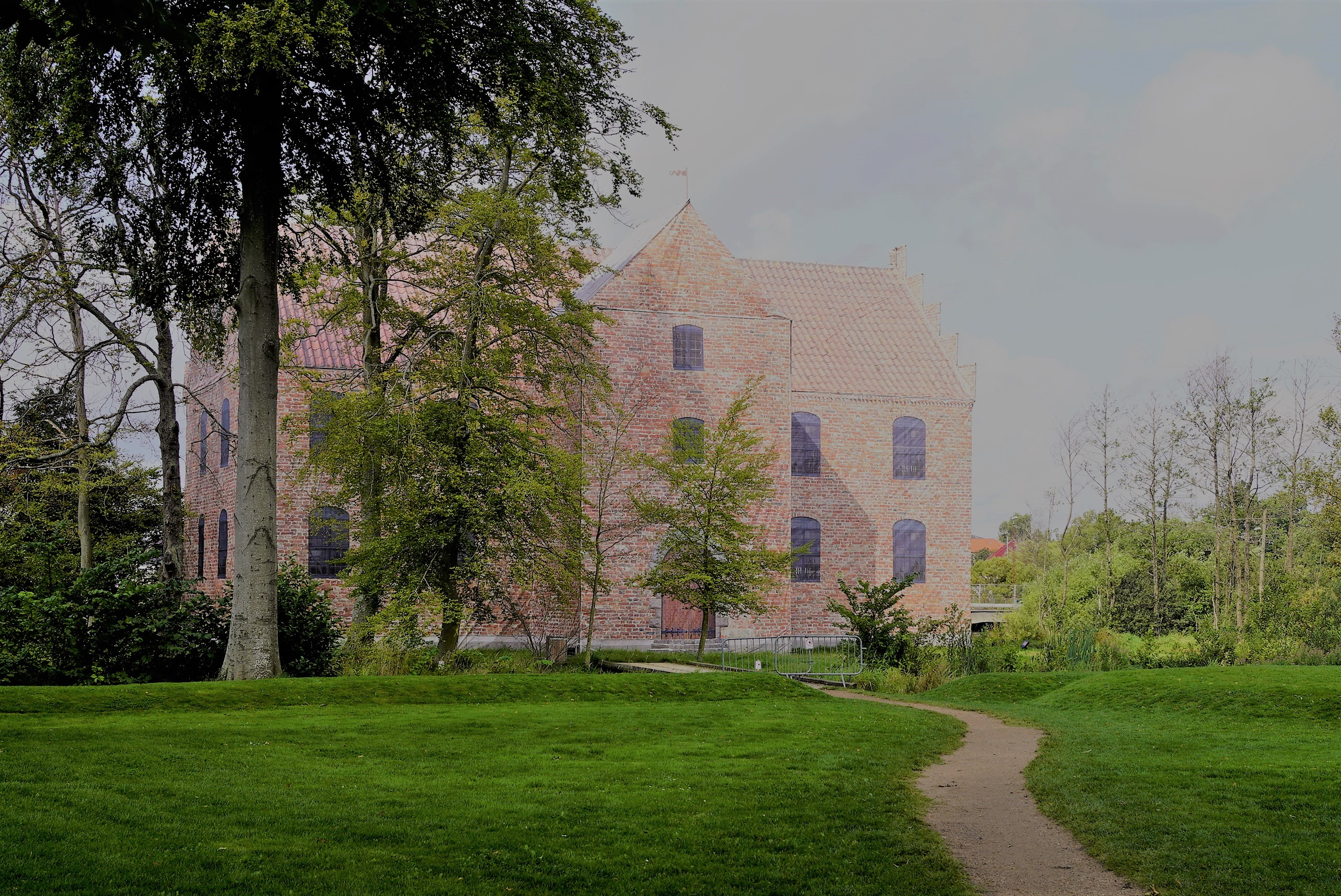 Visualisering af Silkeborg Slot 2017, set fra øst